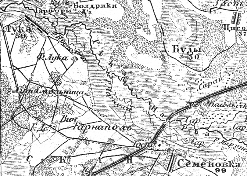 Łuka i Budy na starej mapie.